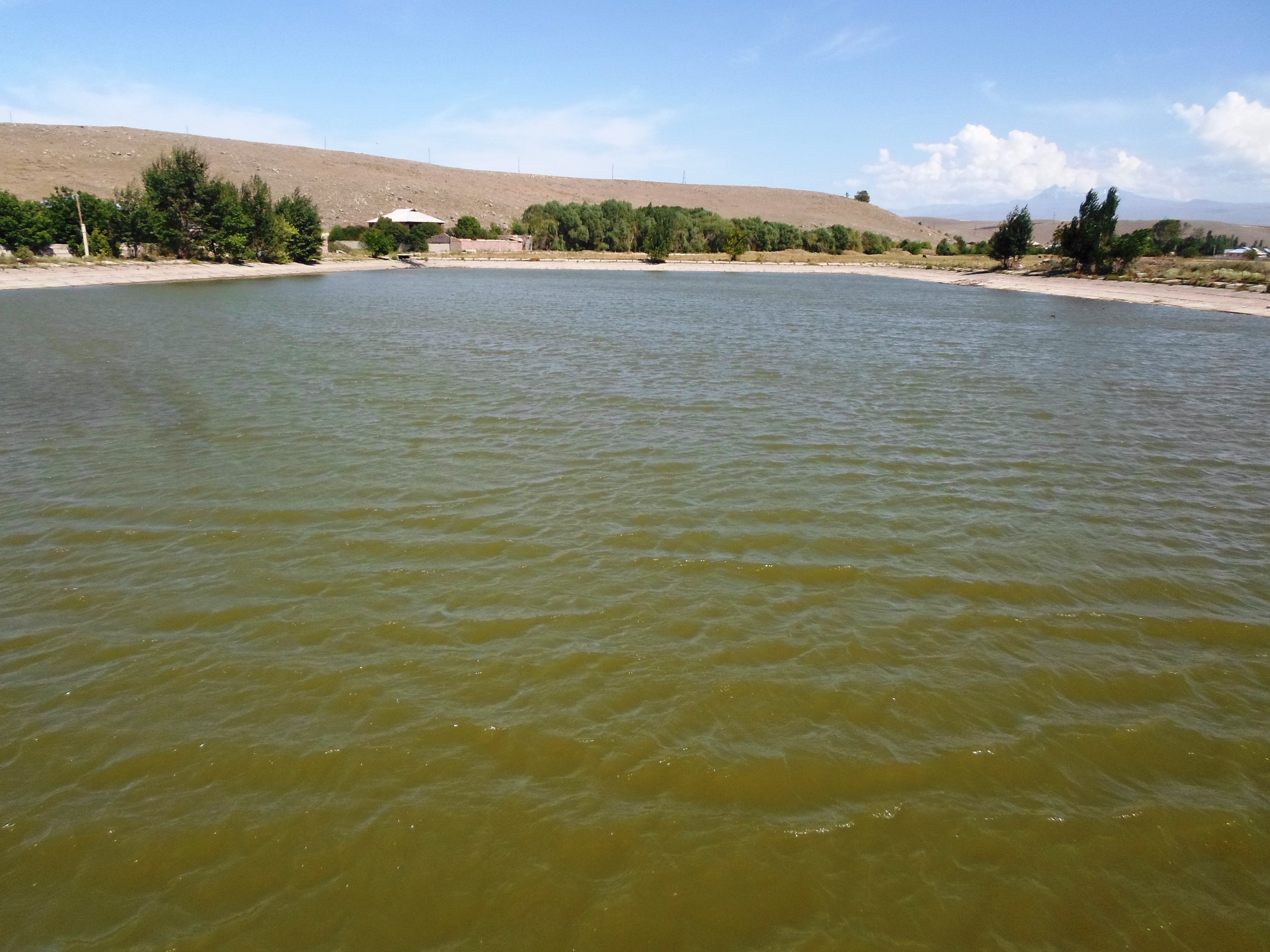 Բենիամին և Ազատան համայնքների ոռոգման համար նախատեսված ջրամբար